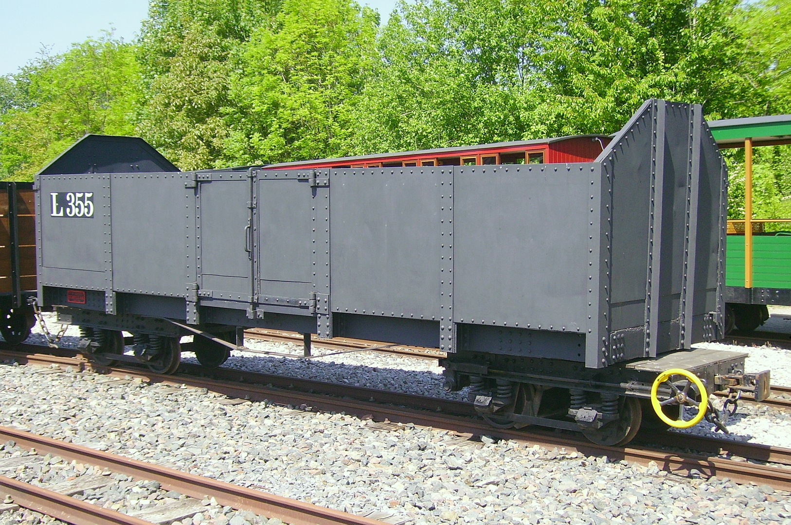 Le wagon tombereau Decauville à bogies L355 ex-Tramway de Pithiviers à Toury, du Chemin de fer Froissy-Cappy-Dompierre le 23/05/2010.